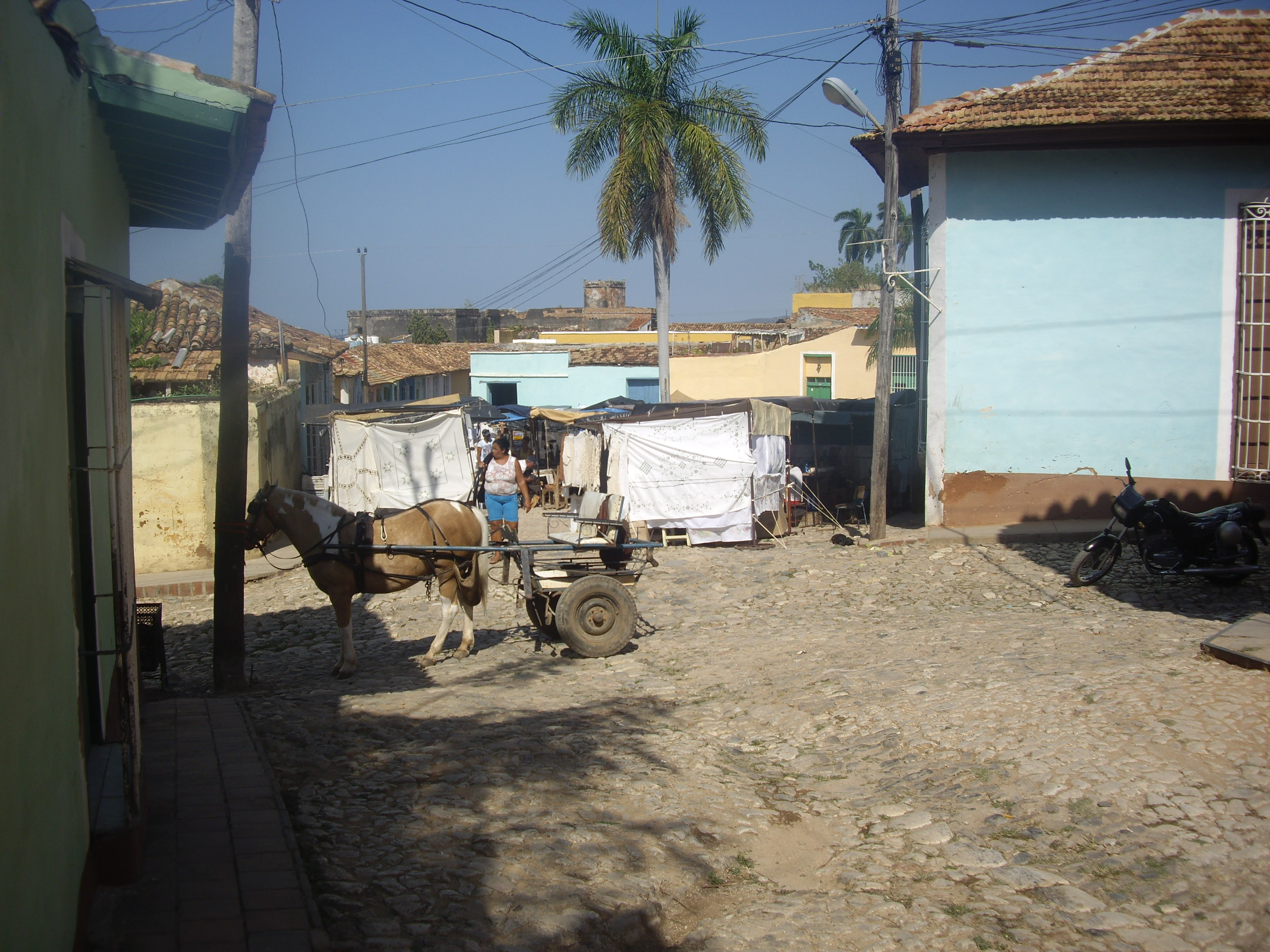 Mercat a la plaça de les Tres Palmitas a Trinidad Cuba